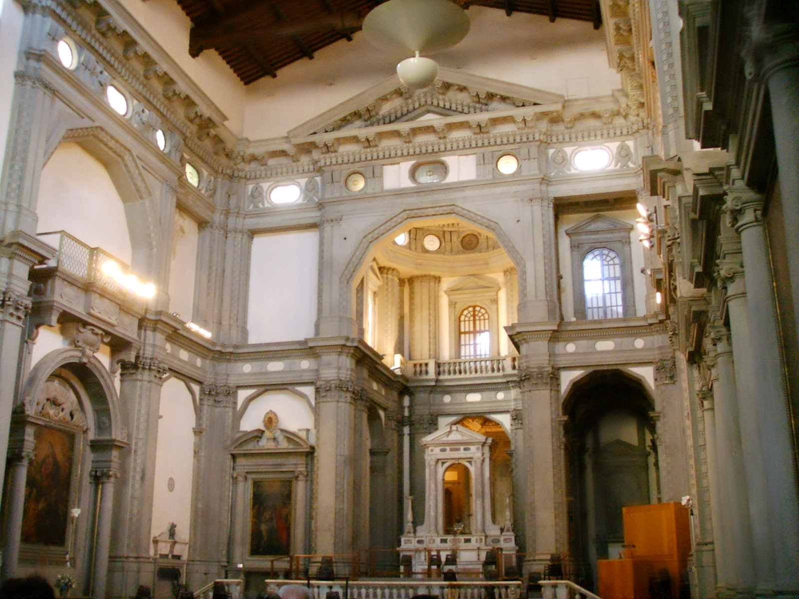 Santo stefano al ponte, interno